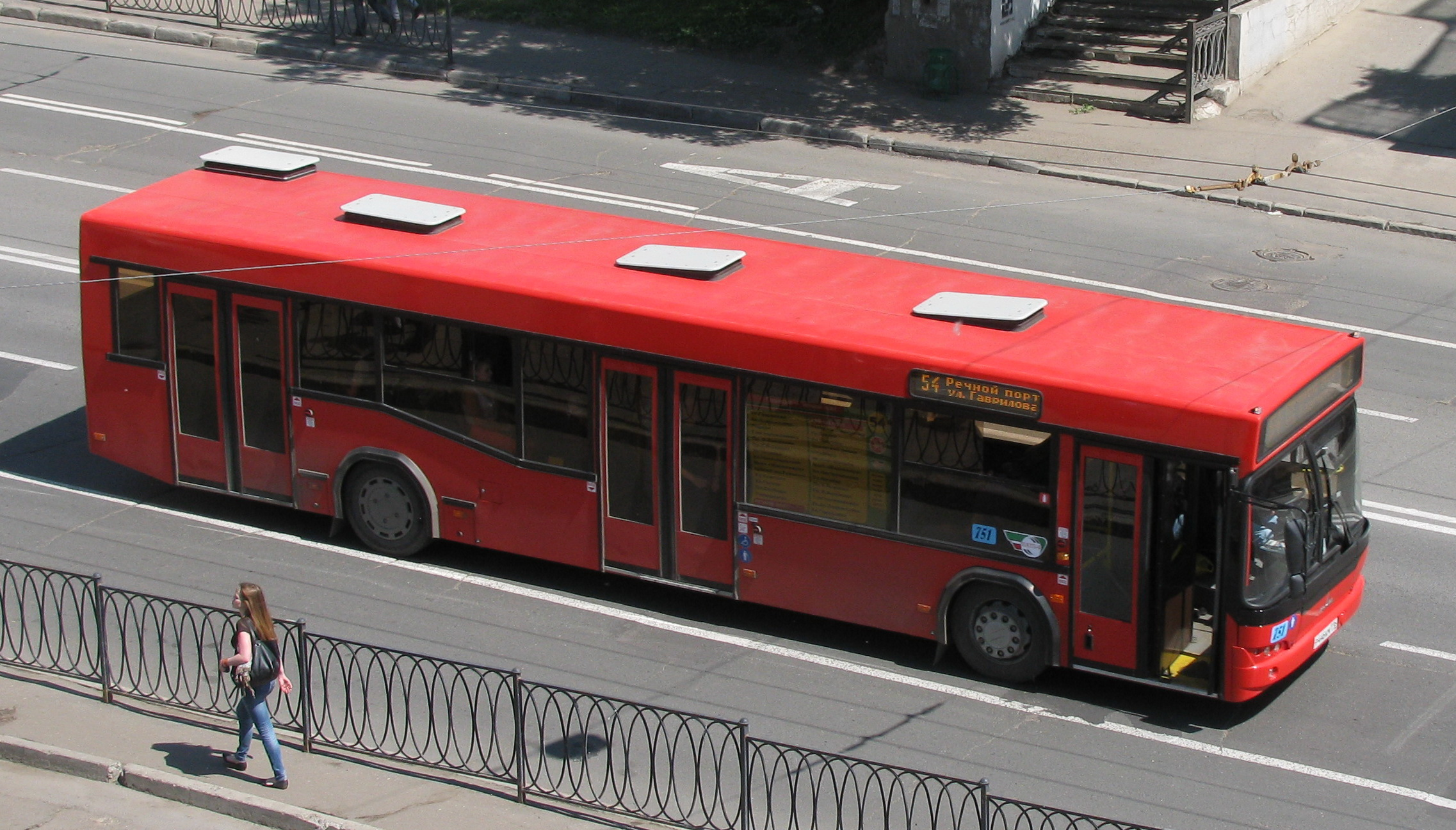 Автобус Маз в Казани